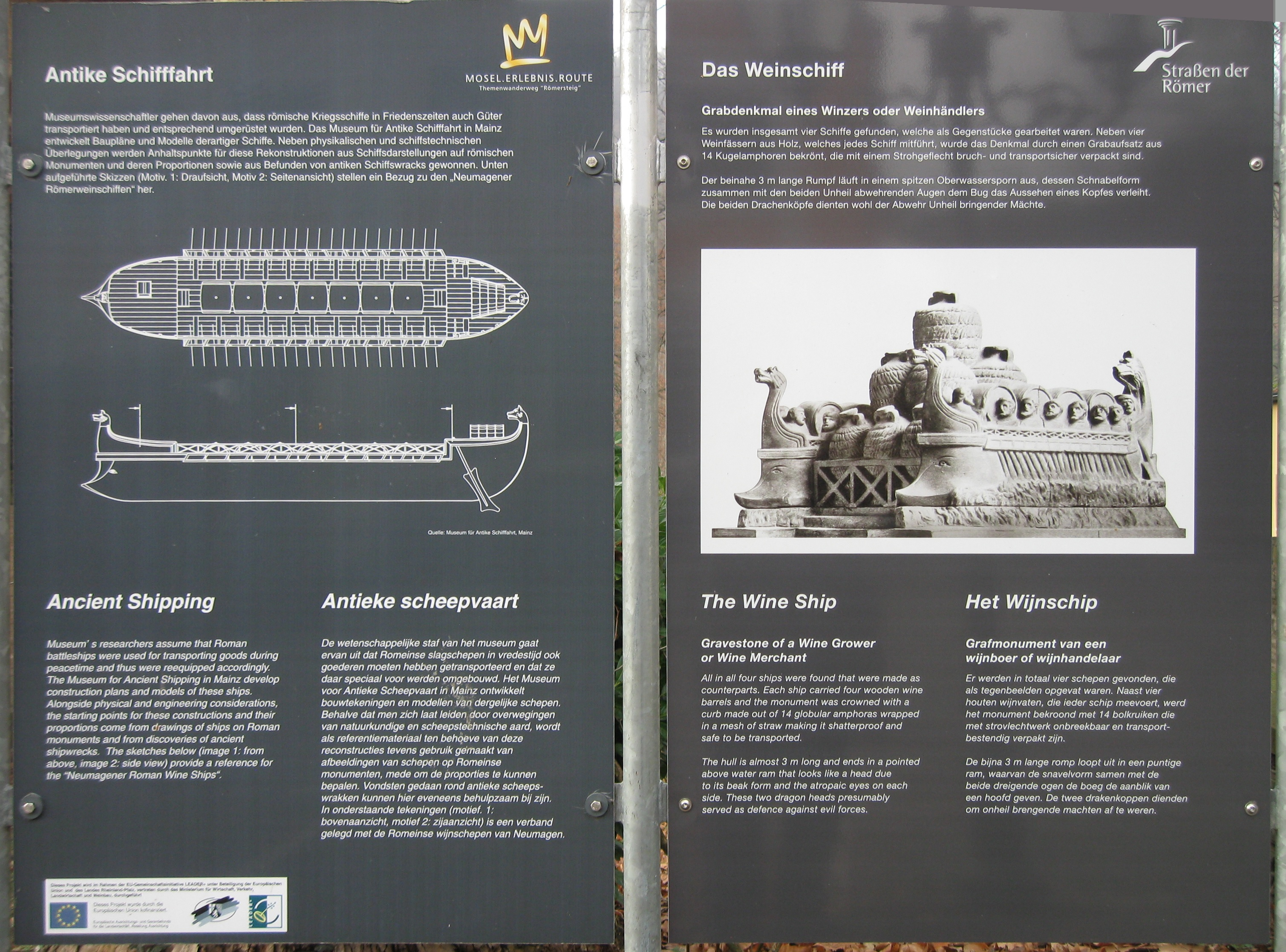 La barca del vino de Noviomago, Río Mosela